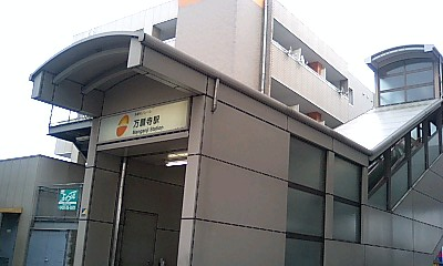 万願寺駅入り口